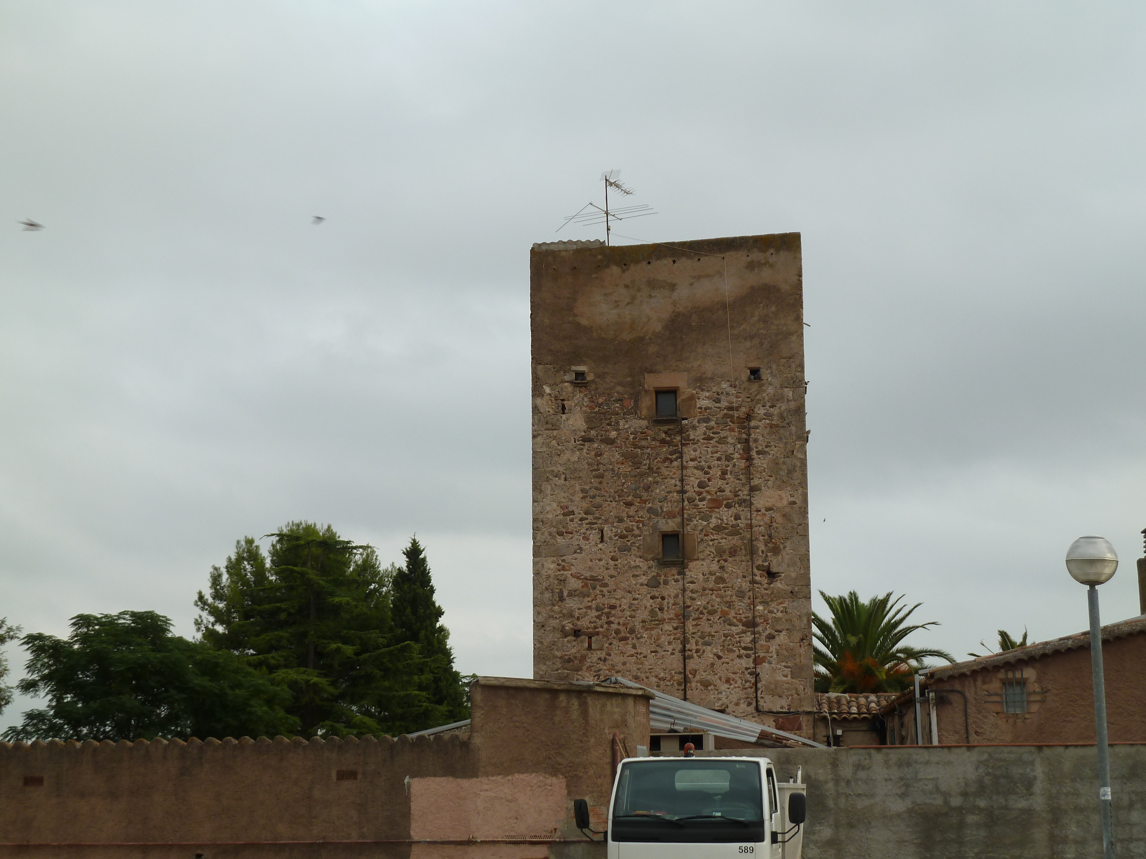 Castellarnau, o Torre Berardo Gòtic, obra popular XVI, XIII - XIV, XVII